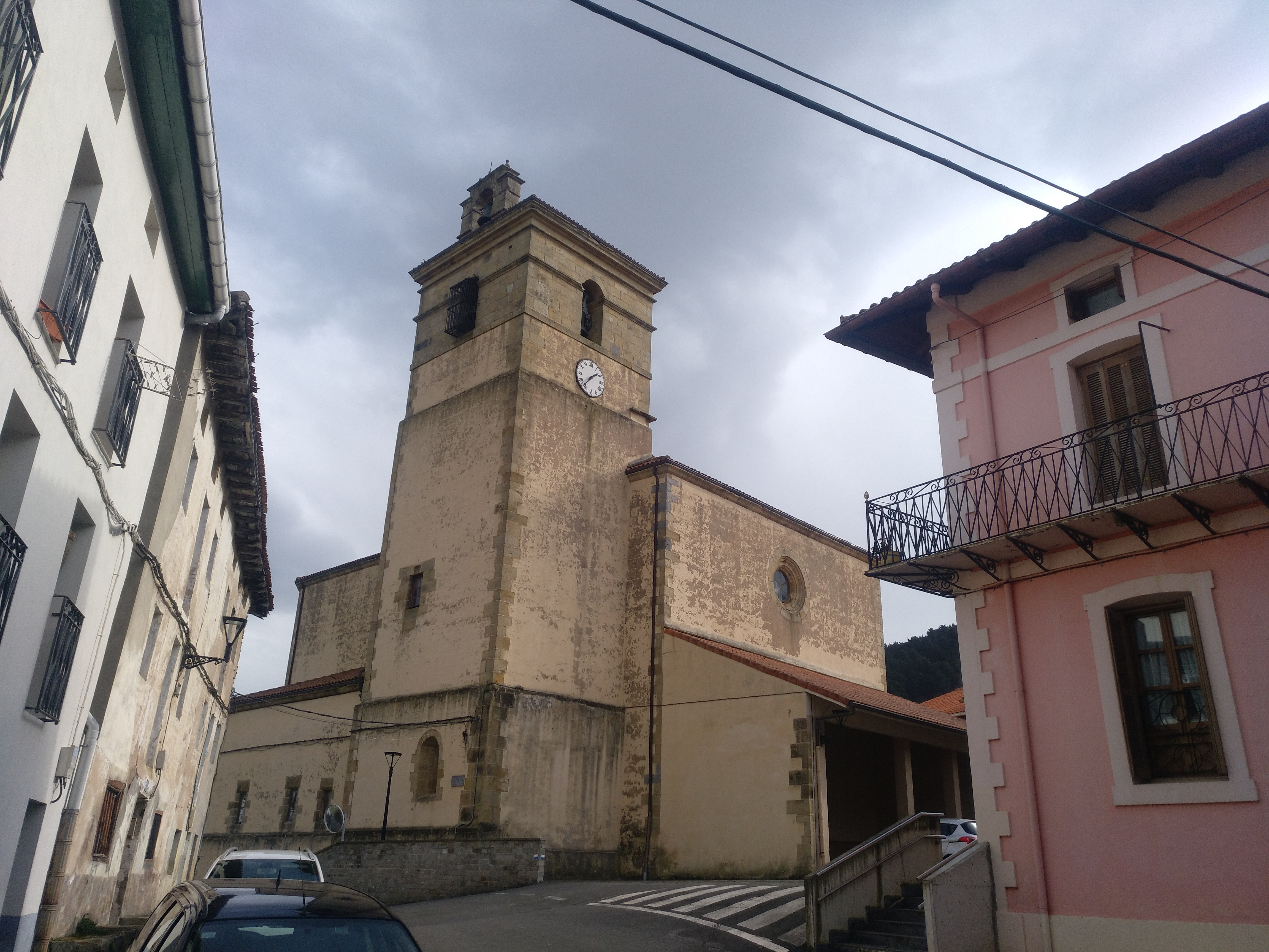 Zestoako Arroa goia auzoa